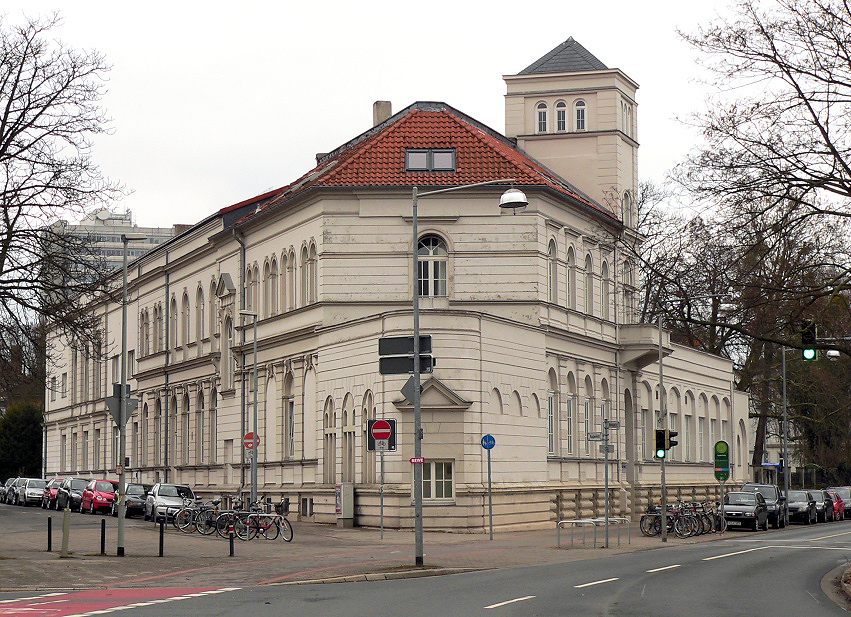 Parkhaus in Hannover an Herrenhäuser Gärten